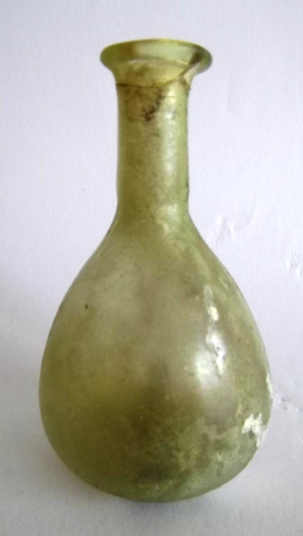 Römisches Parfumfläschen, 1.-3. Jh.n.Chr., ca. 8,2 cm hoch